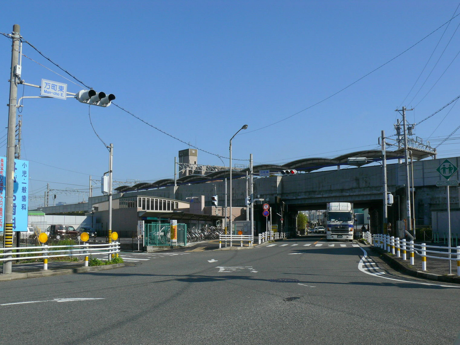 名古屋臨海高速鉄道西名古屋港線小本駅の西側駅前。